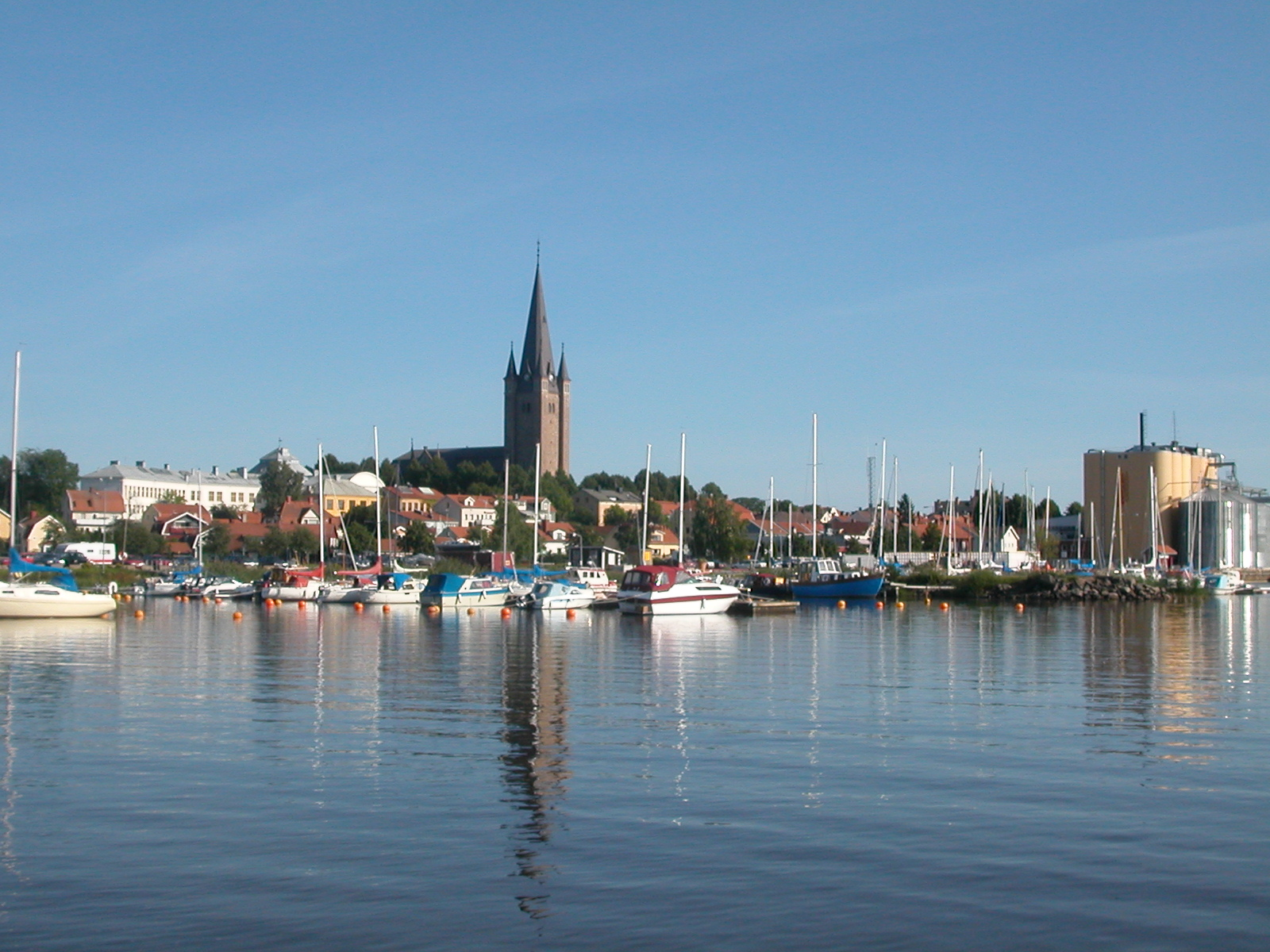 Mariestad sett från Vänern